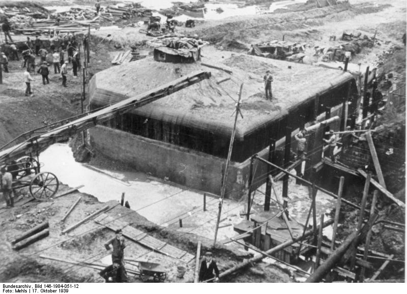 Dillingen, 4 km nördlich. Saarlautern. 17.10.39 Westwall. Bau eines 3-Schartenstandes an der Nordseite der Bahnlinie Dillingen-Nitaltdorf. Heeresfilmstelle Bildberichter: Mehls